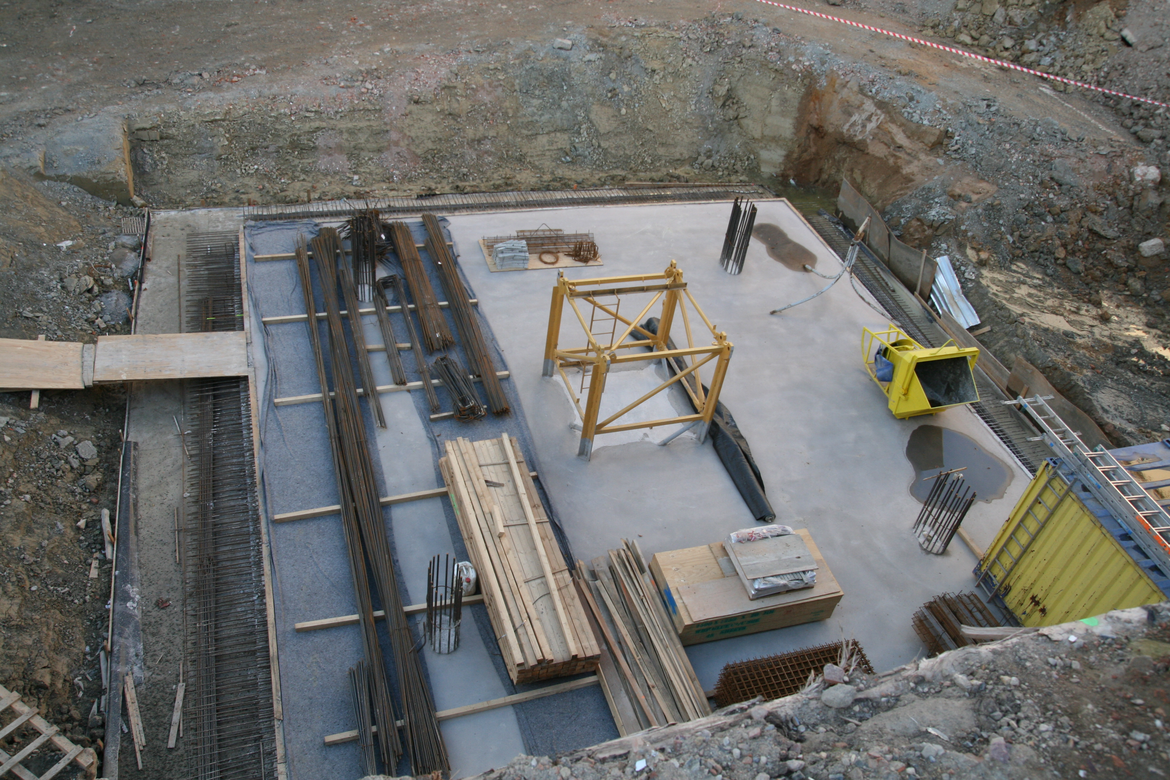 Stavba podzemních garáží na ulicích Besední a Veselá v Brně-střed, označená za 1. etapu výstavby Janáčkova kulturního centra Brno, tzv. Sálu pro Brno. Tzv. Den otevřeného staveniště 30. října 2016. ([1], [2]) Základová deska pro instalaci jeřábu.